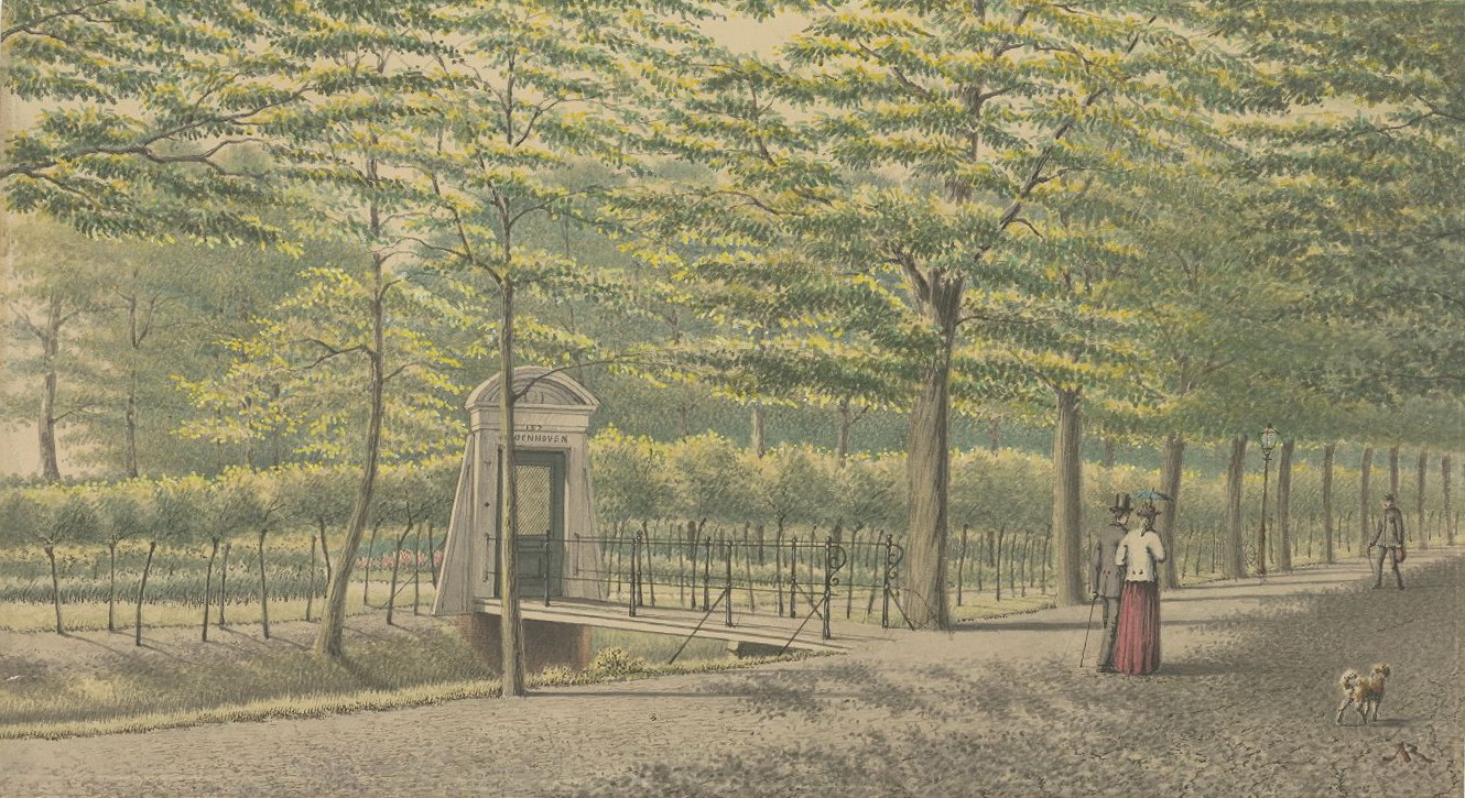 Ingang van Groenhoven aan de Witte Singel te Leiden. Tekening in kleur door Rieke, J.M.A., 1897.